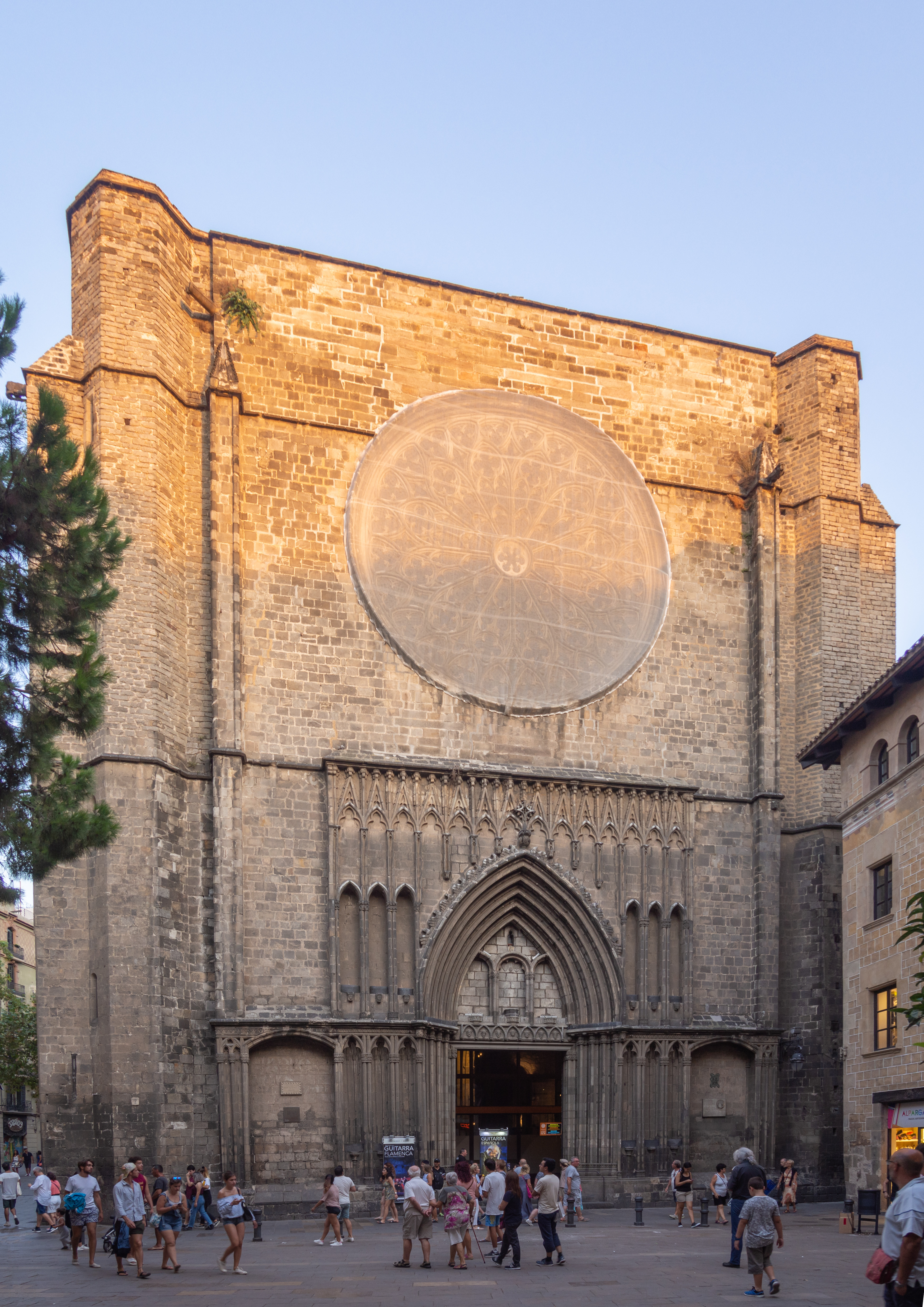 Basílica de Santa María del Pino